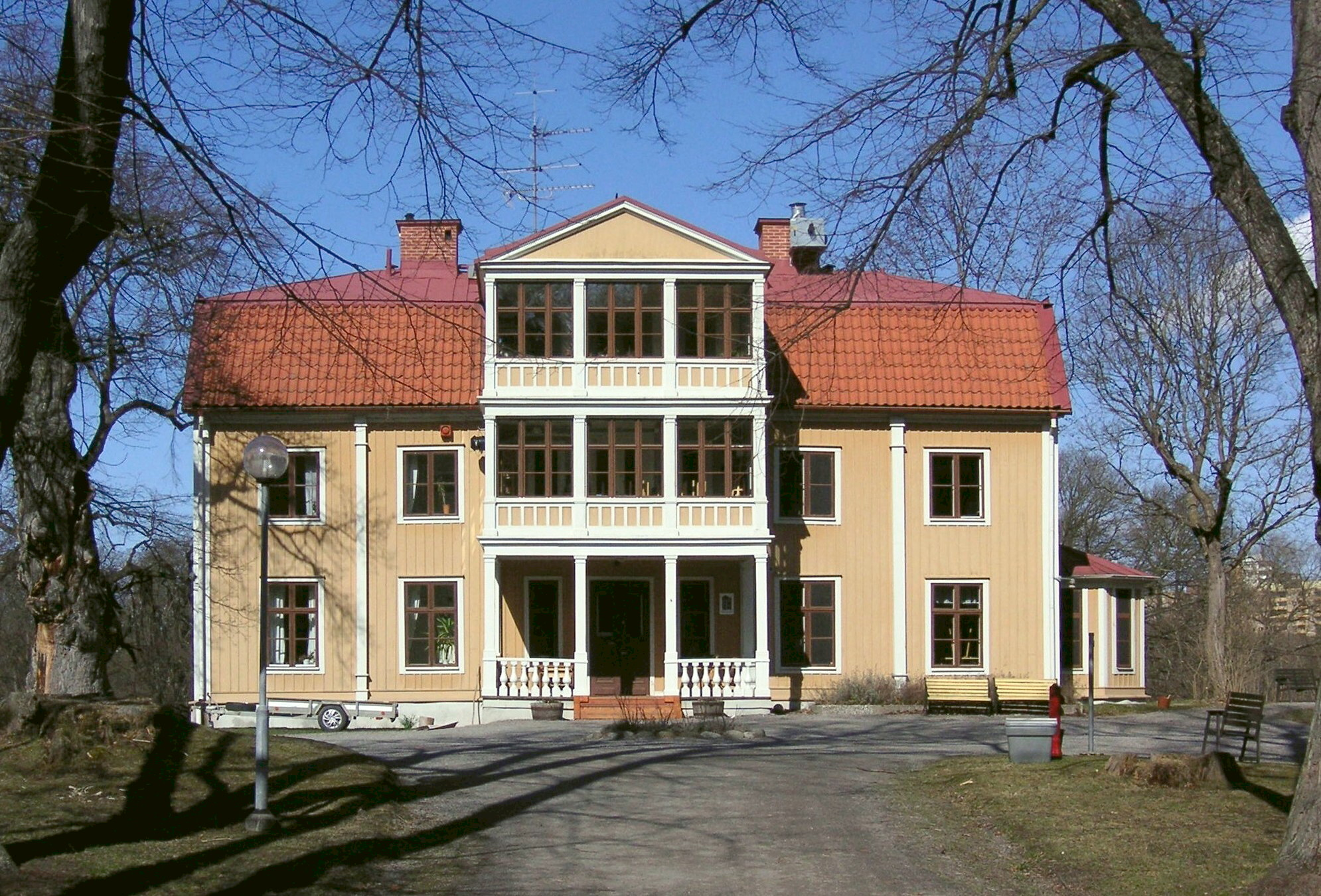 Johannelunds gård i Traneberg, Stockholm 2008